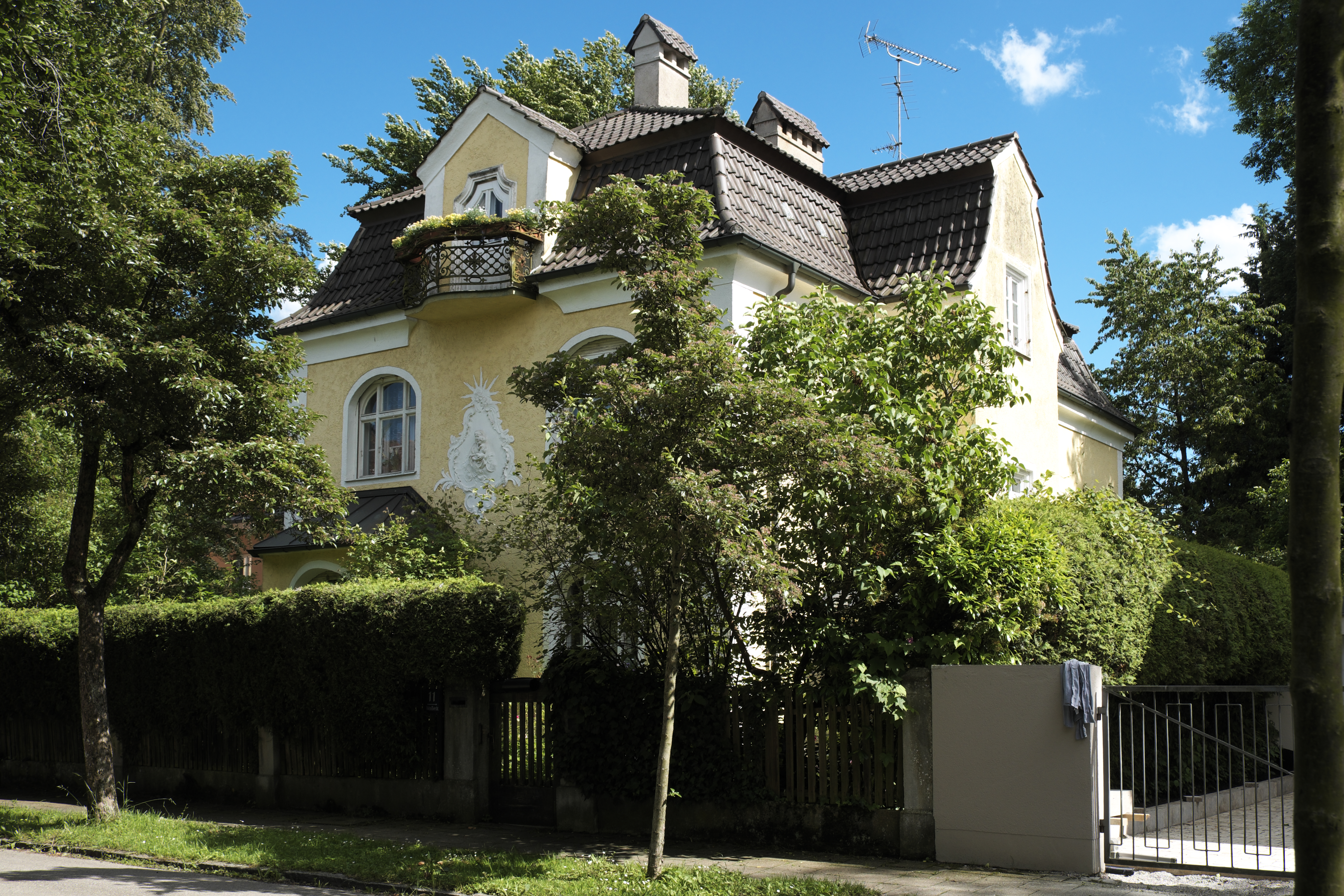 Villa in der Hofmillerstraße 1 in Obermenzing im Stadtbezirk Pasing-Obermenzing in München (Bayern/Deutschland)